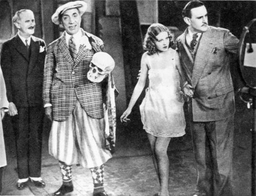 Still from Constantin Tănase's movie "Visul lui Tănase" (1932) (IMDb entry)